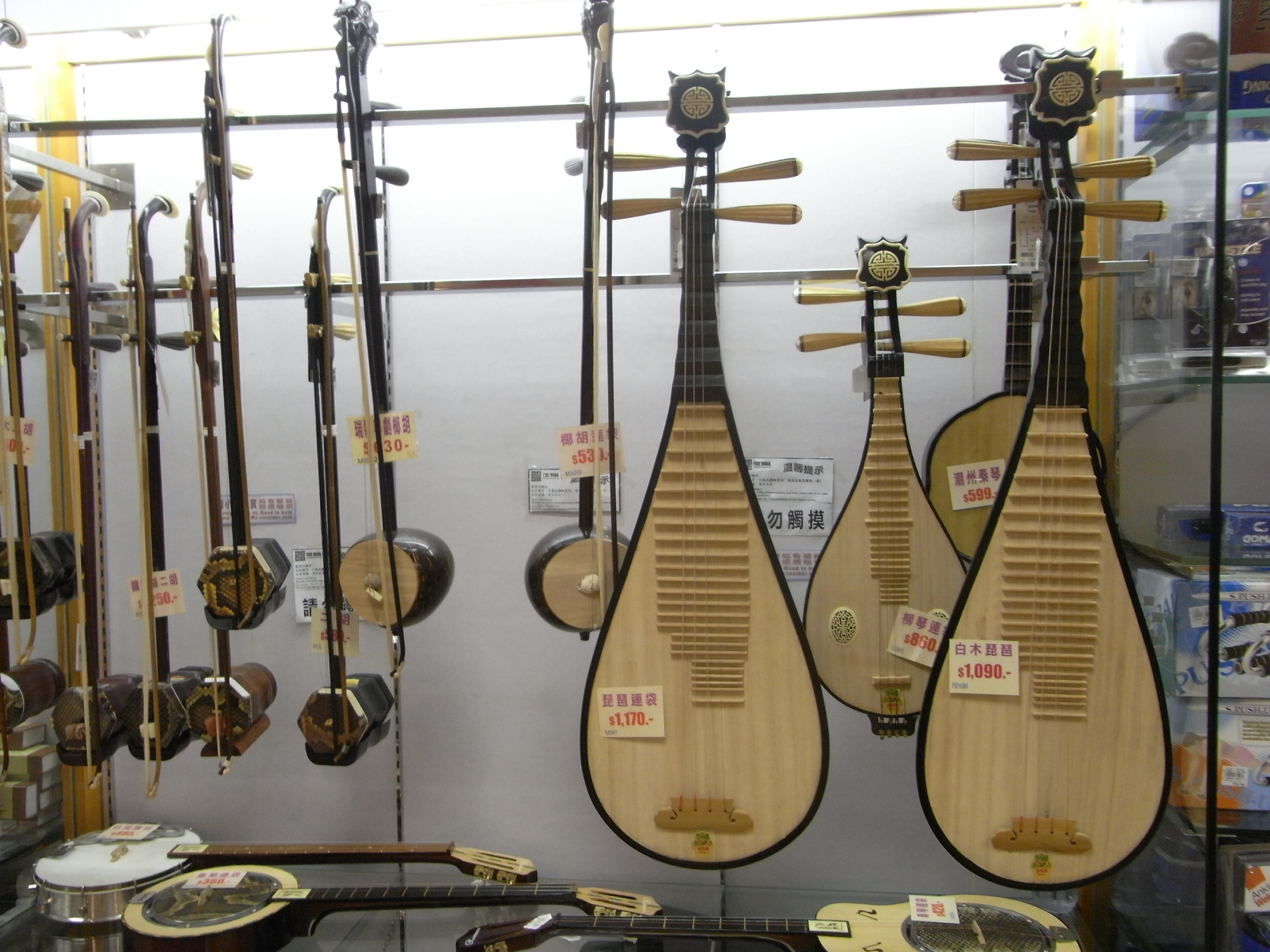 九龍佐敦 裕華國貨 中式音樂儀器 陳列品